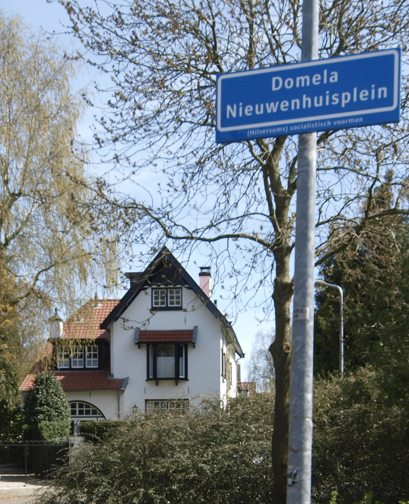 Huis waar Domela Nieuwenhuis de laatste jaren van zijn leven heeft gewoond.